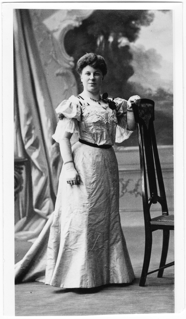 Olga Topp (1872–1961) innehaver og driver av Hjorten Revy- og Varietéteater i Trondheim, også en tid eier av Britannia Hotel